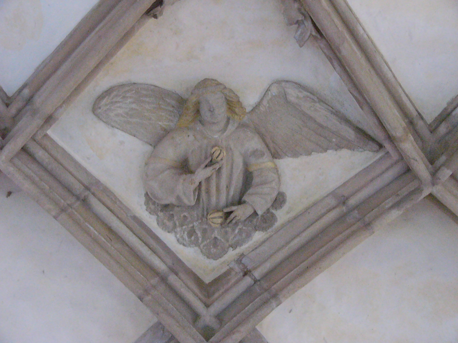 Musizierende Engel im Gewölbe des Himmelkroner Kreuzgangs